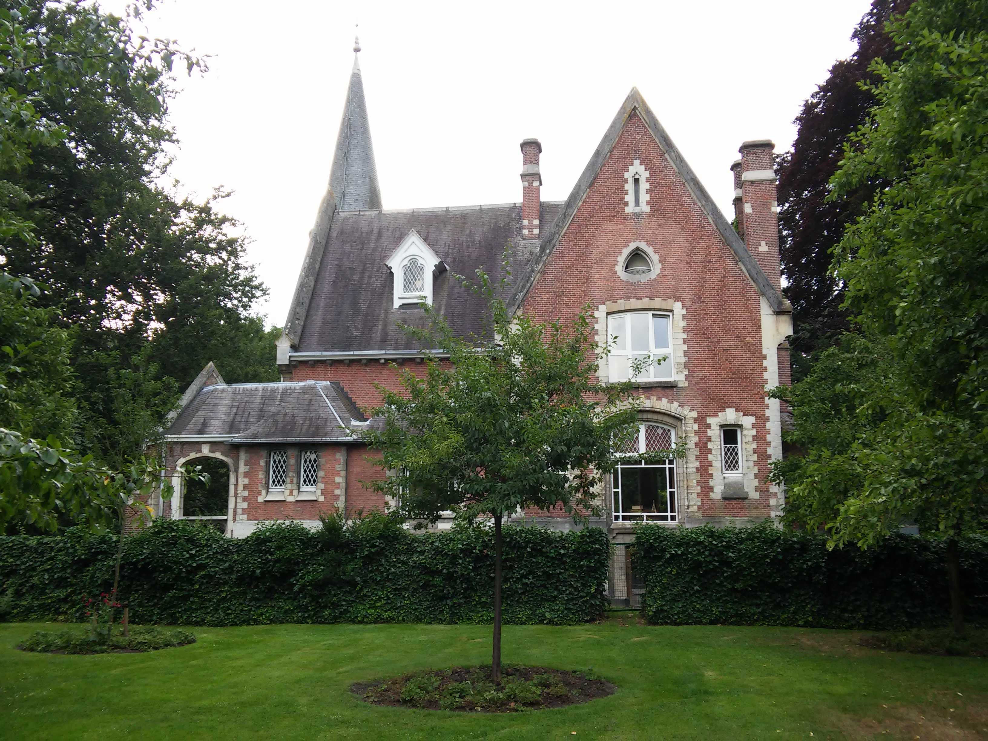 Villa La Chapelle (RUCA). Oorspronkelijk hovenierswoning bij domein Den Brandt, later villa van de familie Kreglinger, in 1926 getransformeerd tot huidig uitzicht